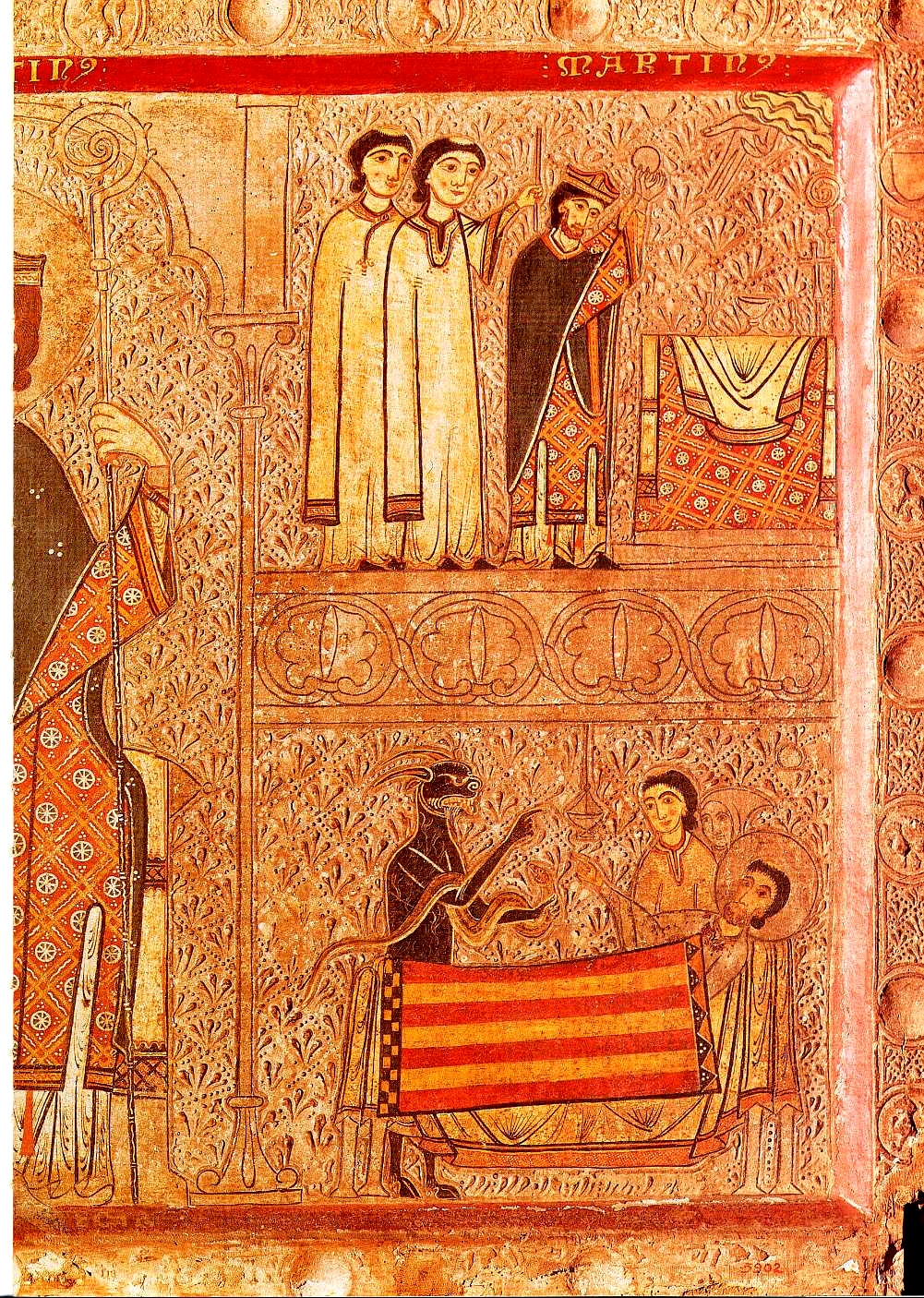 Escenas de la vida de San Martín procedente de la iglesia de San Martín de Chía (Huesca). El frontal se encuentra en el Museu Nacional d'Art de Catalunya